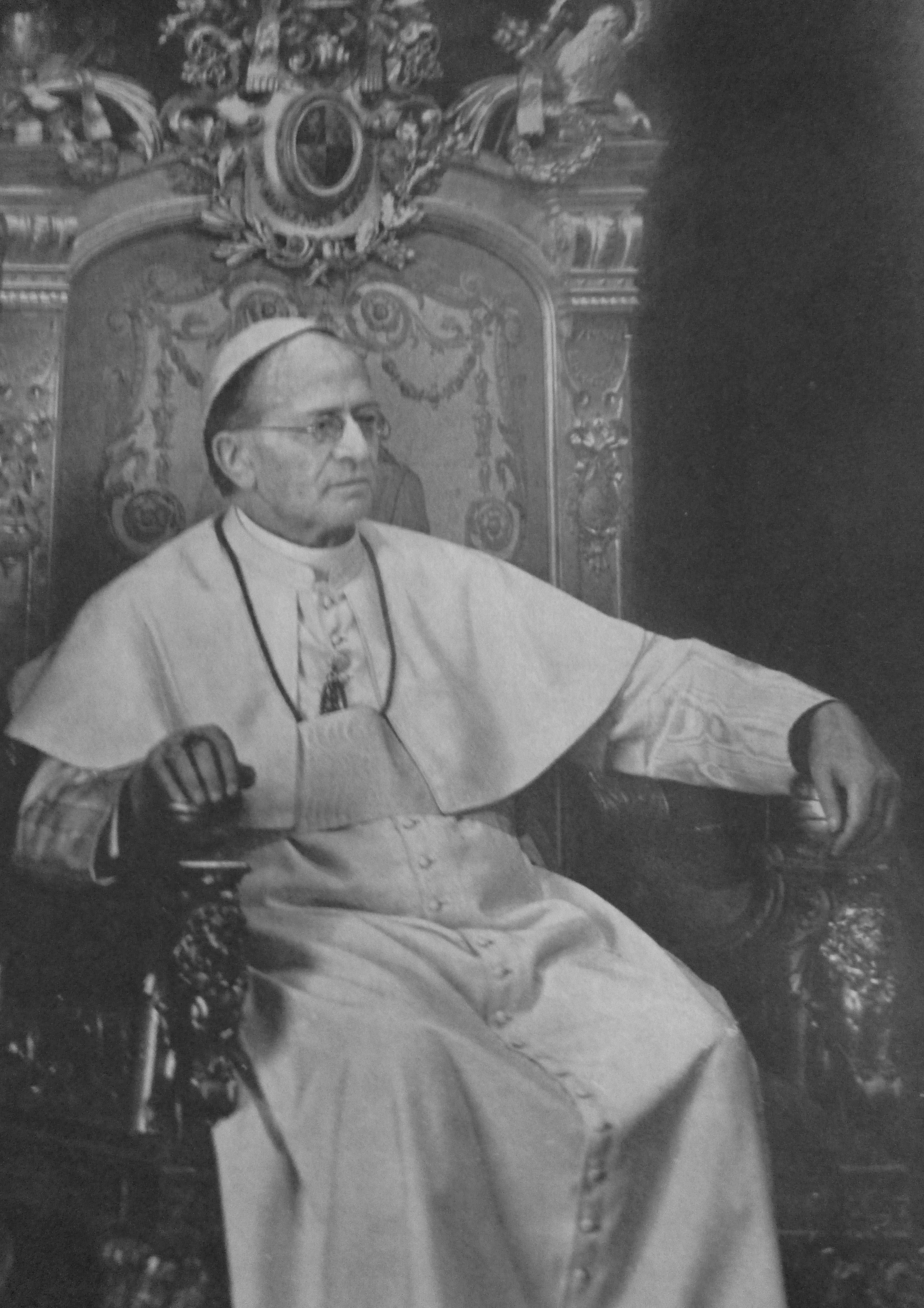 Pie XI, photographie prise le 6 février 1939 et parue dans L'Illustration, numéro hors série de février 1939 consacré à la mort du pape.